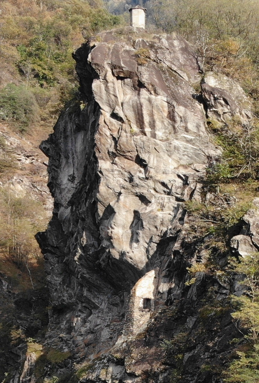 Case dei Pagani Ansicht von Westen